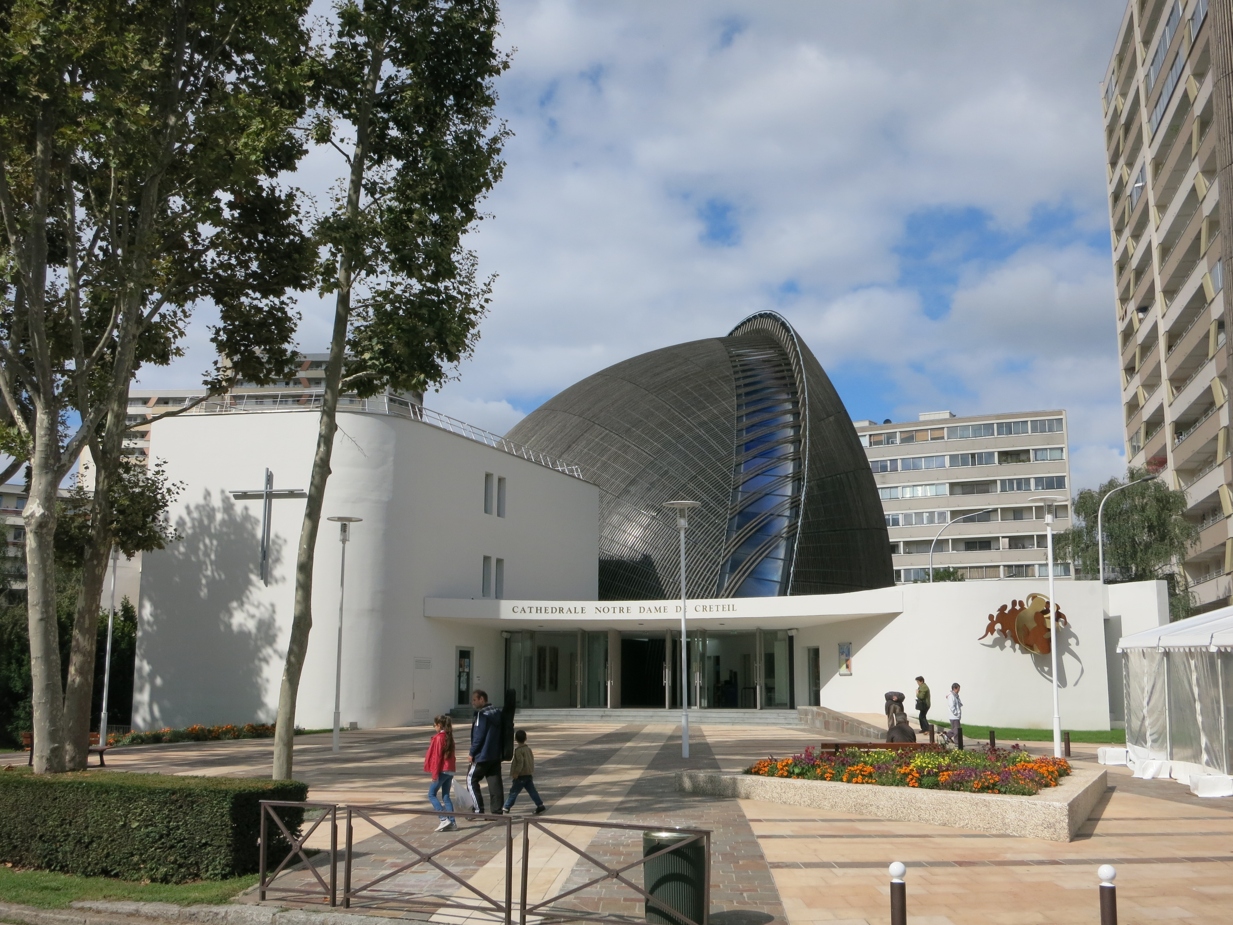 Außenansicht der (neuen) Kathedrale in Créteil.